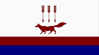 Прямоугольное полотнище, состоящее из расположенных горизонтально в последовательности сверху вниз трех полос белого, маренового (темно-красного) и темно-синего цветов. Ширина верхней полосы составляет 2/3 ширины флага. По центру верхней полосы расположено одностороннее изображение основного элемента герба городского округа Саранск, представляющего собой красную (червленую) лису с серебряными глазами, над которой три красных (червленых) стрелы друг возле друга в столб наконечниками вниз. Нижние полосы по размеру одинаковы. Ширина каждой из них составляет 1/6 ширины флага. Соотношение ширины к длине 2:3.